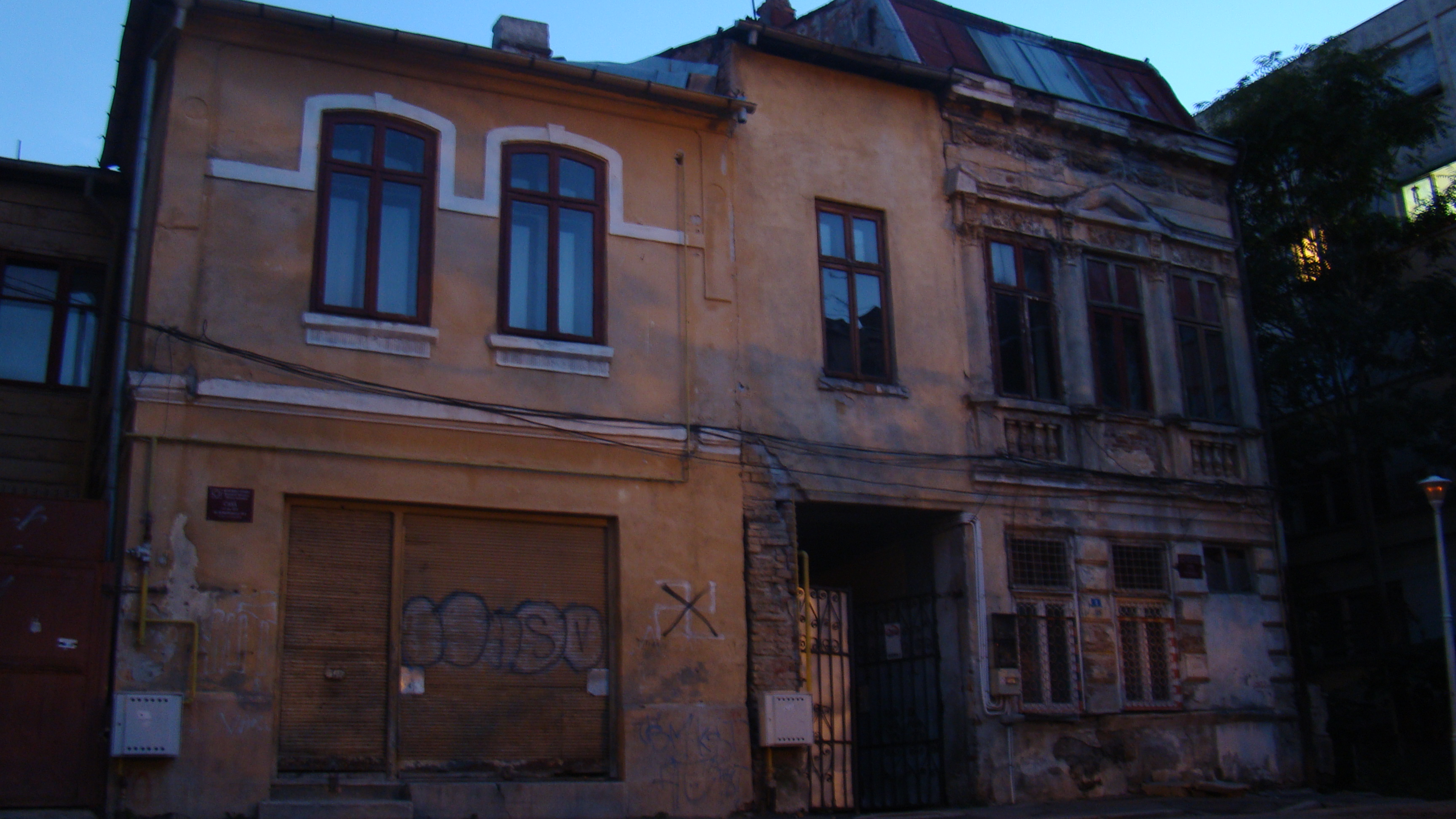 Casă Str Romain Rolland nr 8-10